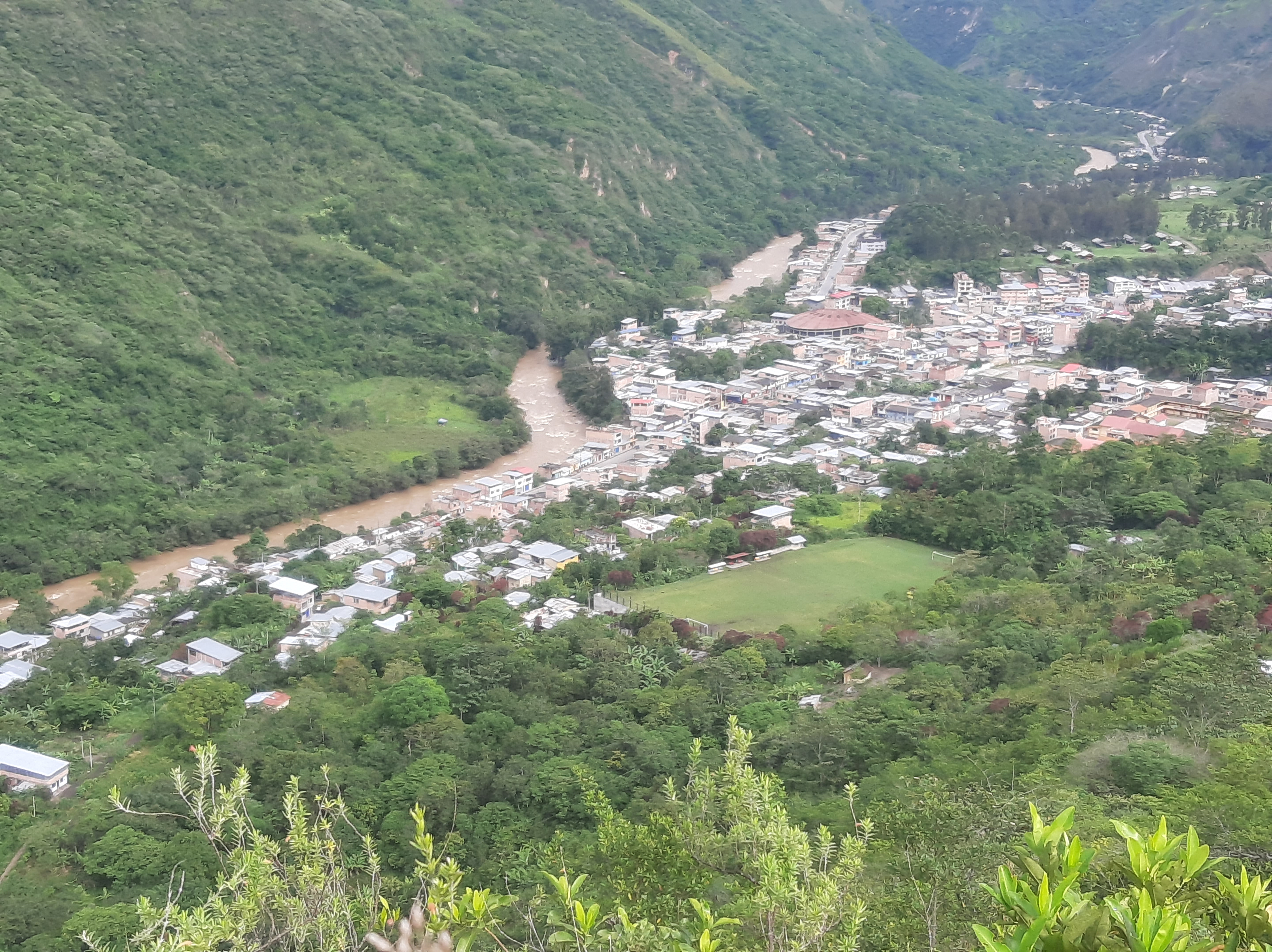 Vista panorámica de la ciudad de Pedro Ruíz Gallo, capital del Distrito de Jazán